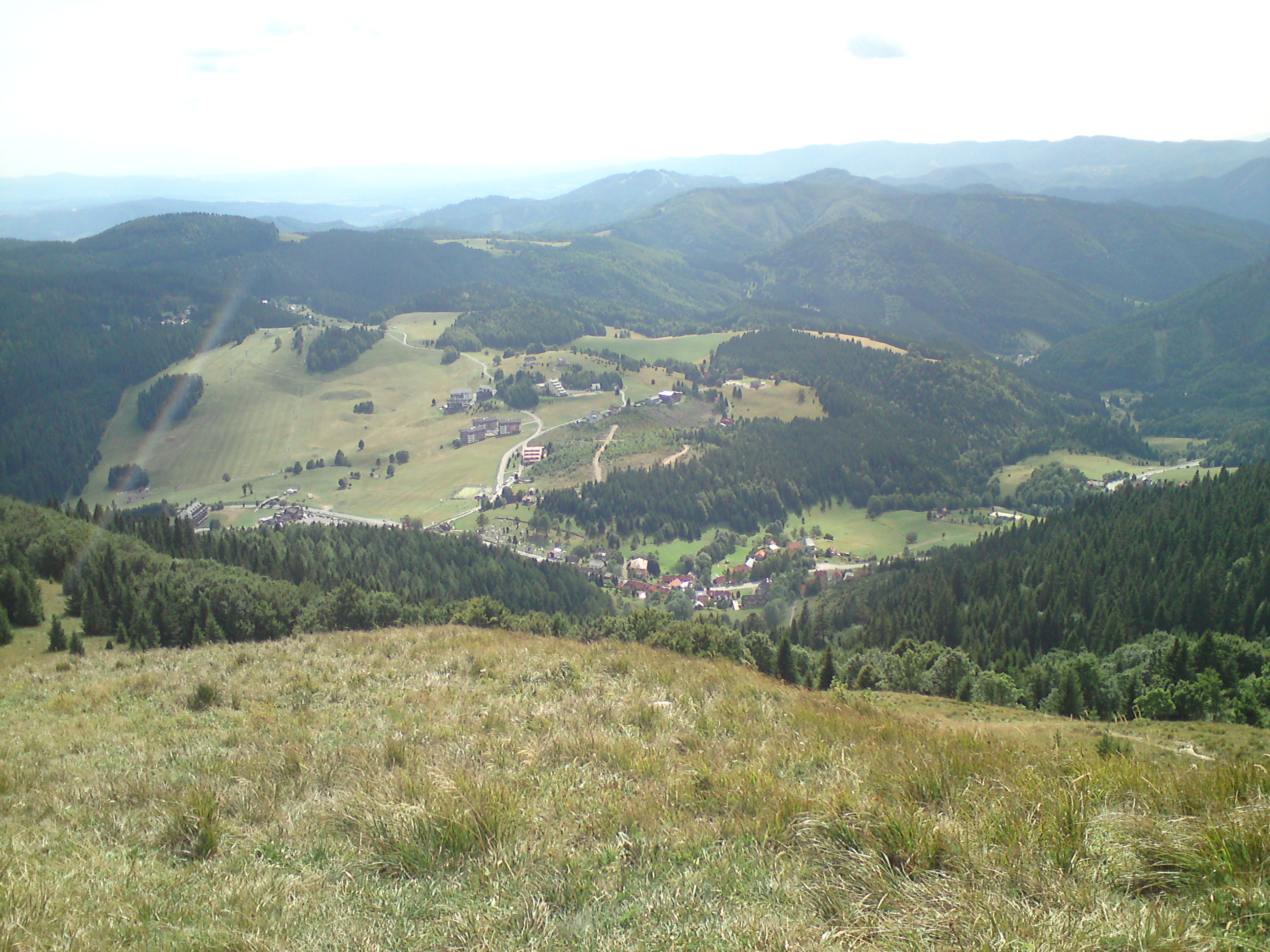 Pohlad na Donovaly